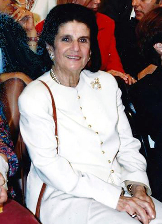 לאה רבין